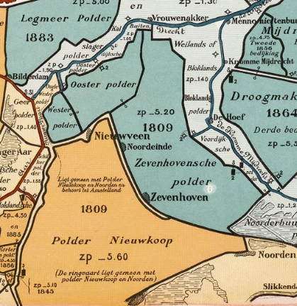 Nieuwkoopsche_en_Zevenhovensche_Polder